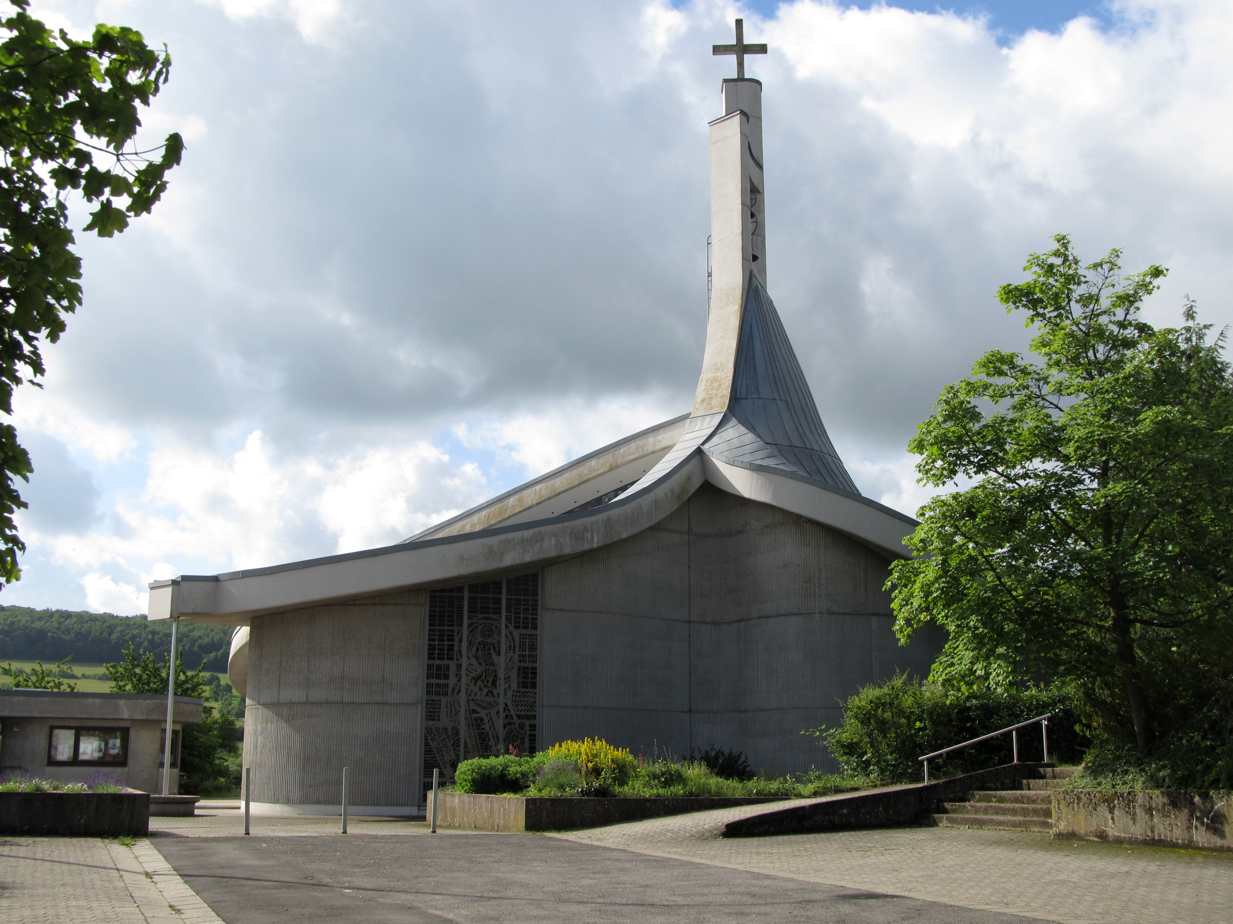 Die katholische Kirche St. Barbara in Herbitzheim, Saarland